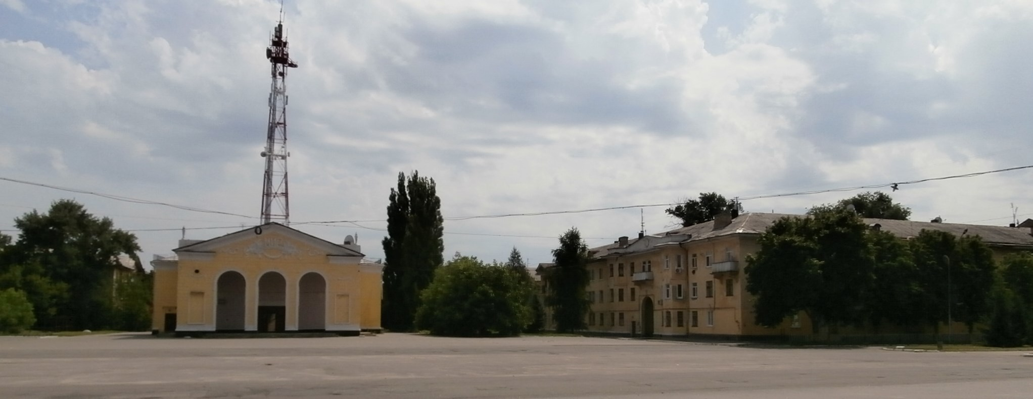 Schowti Wody Leninplatz mit ehem. Filmtheater MIR